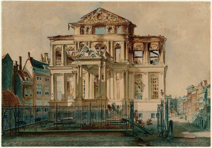 Aquarel de la Schielandshuis après l'incendie du 18 février 1864